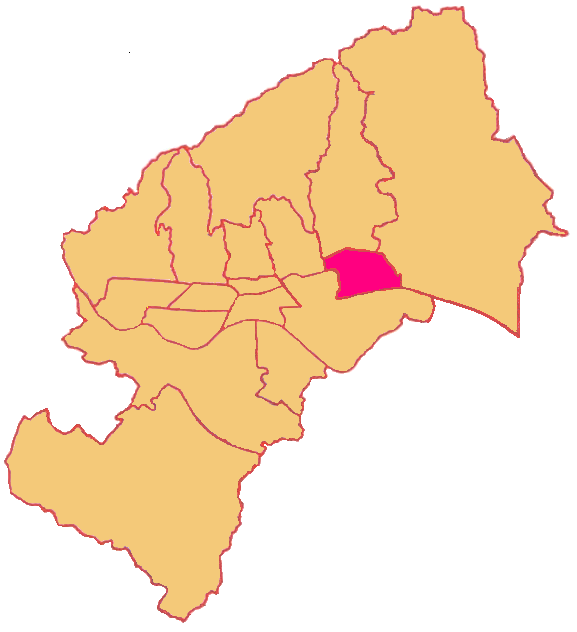 Map of Donja Dubrava District in Zagreb (Gradska četvrt Donja Dubrava)